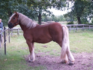 schleswigerKaltblut2